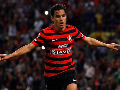 Omar Bravo celebrando un gol con el Atlas.